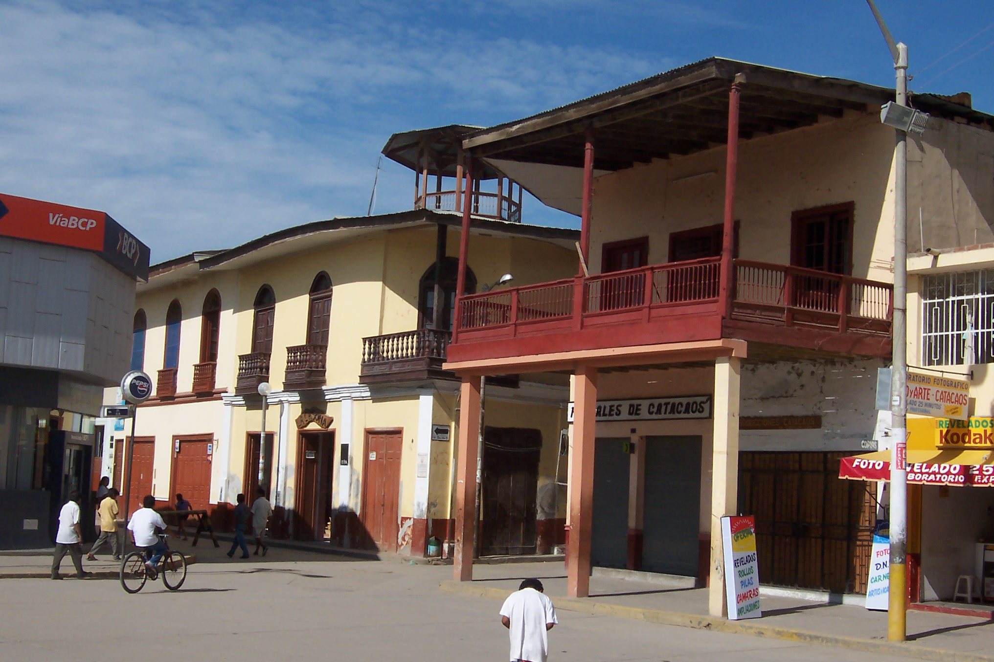 Construcción típica en Catacaos - Perú Autor:Rossemary Fecha:2010